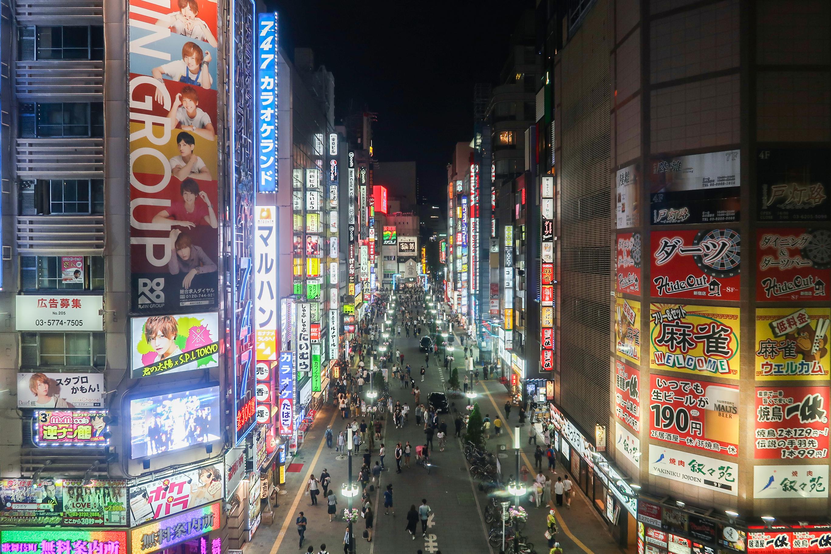 1 Chome-17 Kabukicho, Shinjuku